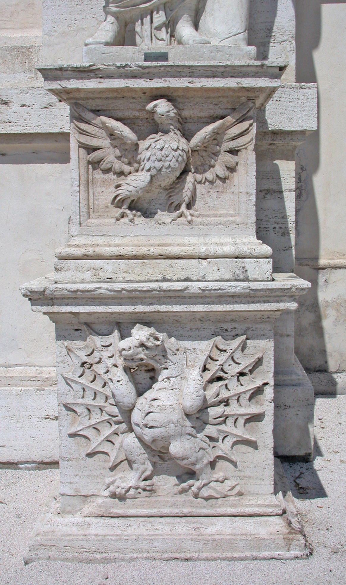 Roma, Villa Borghese, Galleria Borghese, facciata, particolare del piedistallo delle statue con lo stemma Borghese.